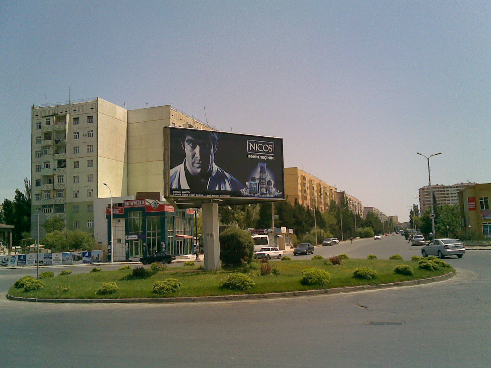 Rəfael Ağayev reklamda